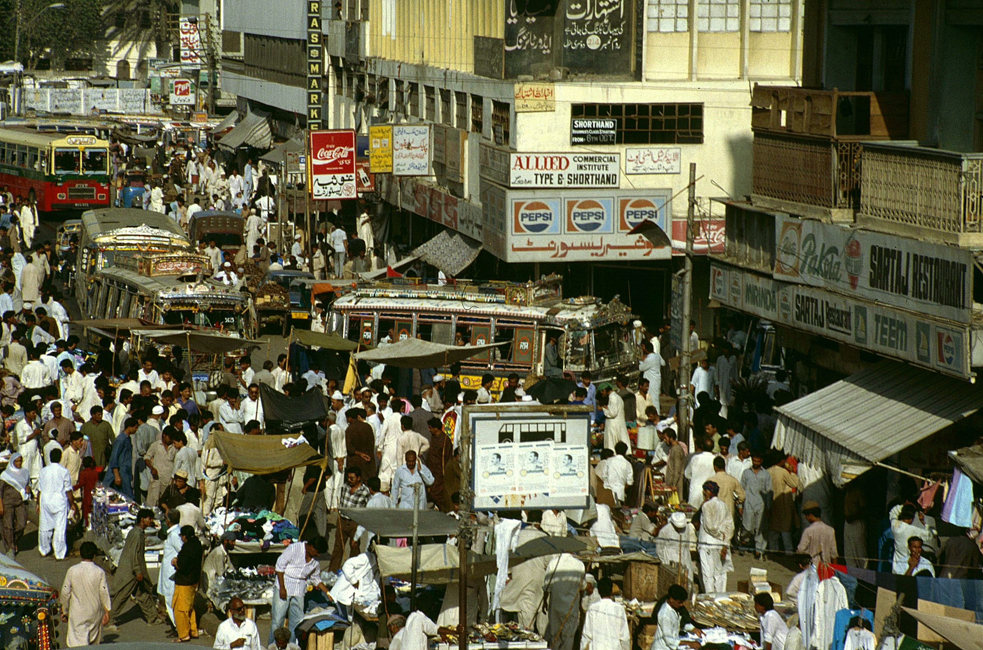 Straße in Karatschi/Pakistan